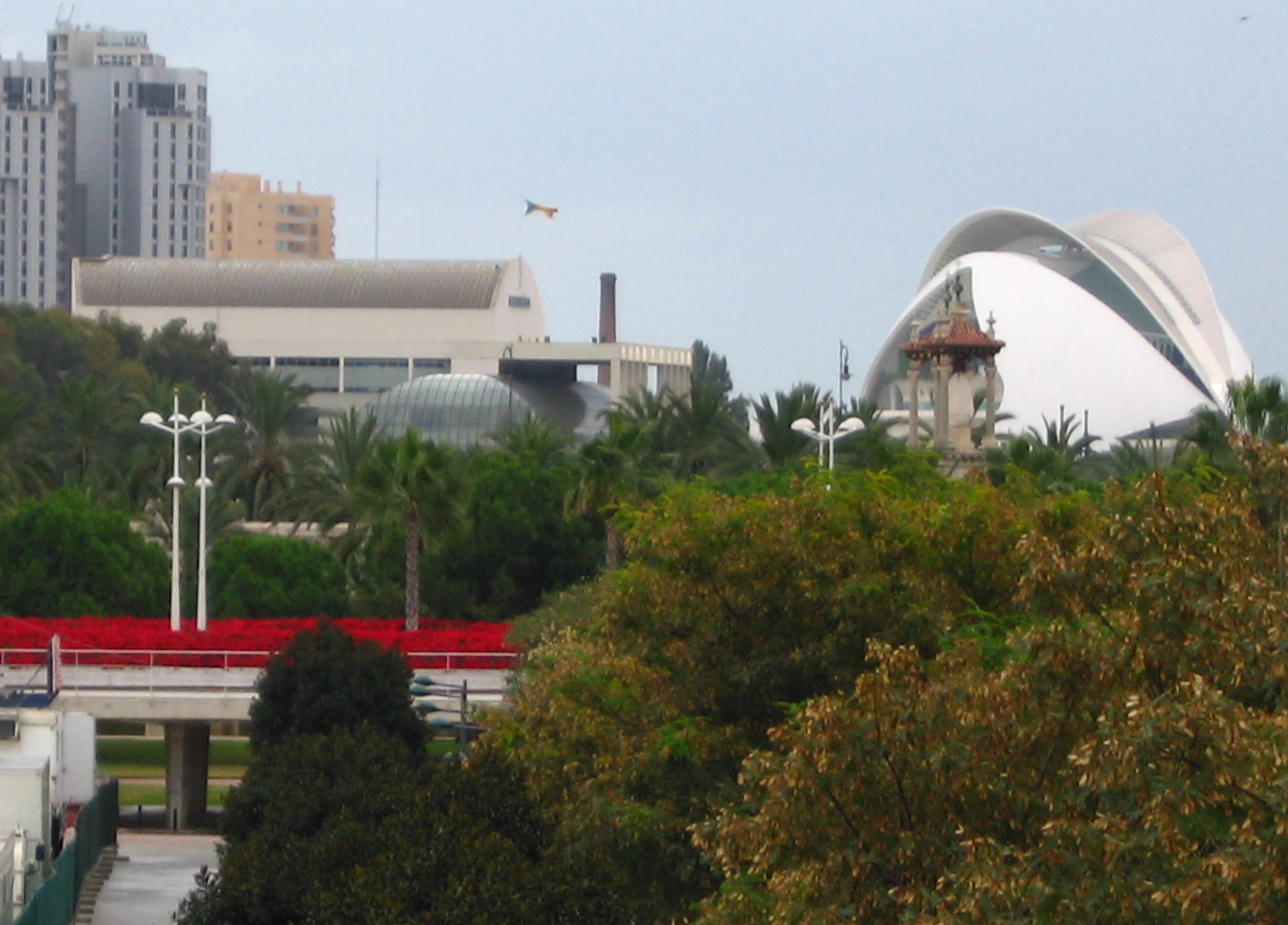 Vista del Palau de la Música de València